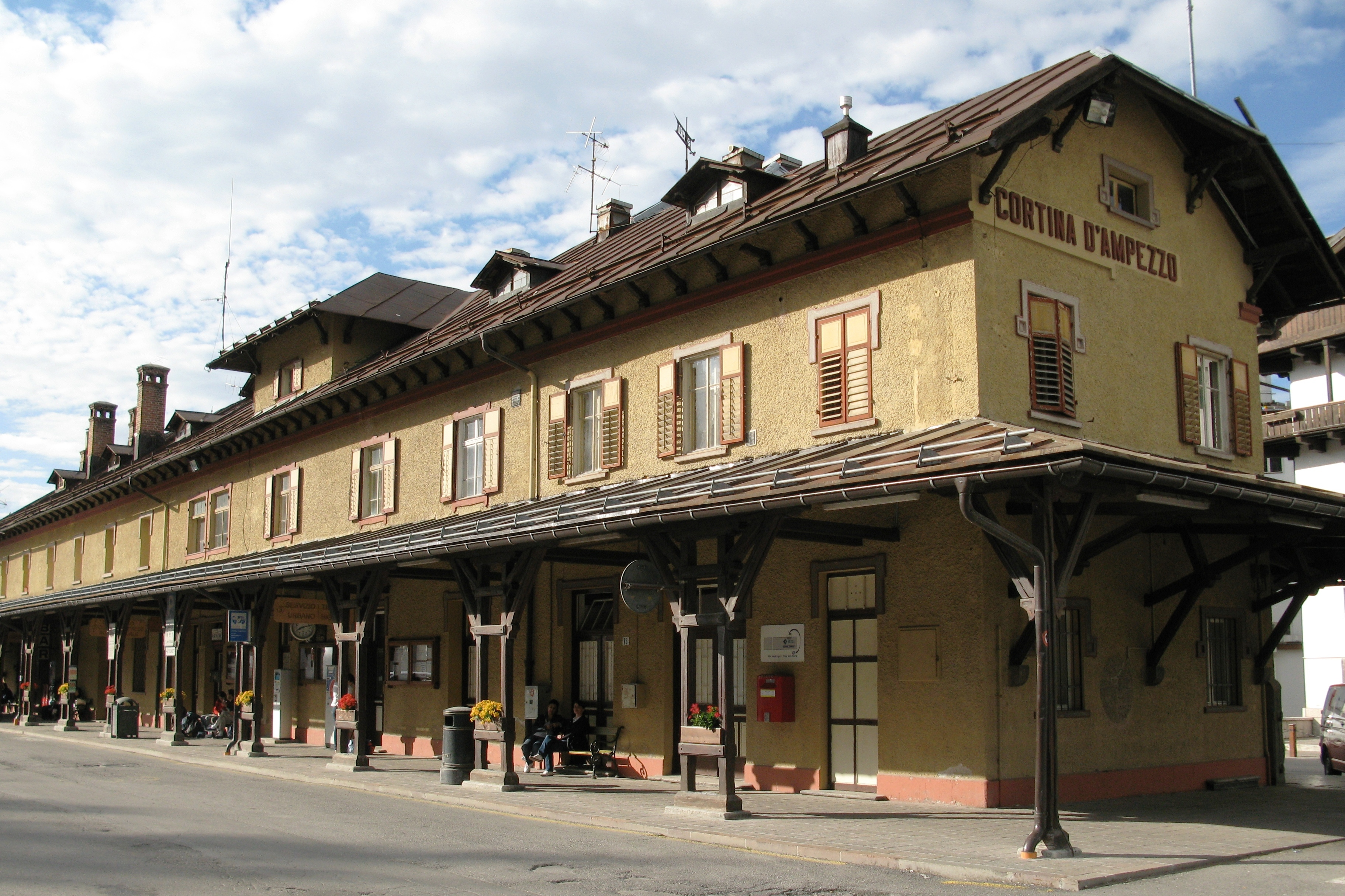 Déi fréier Gare vu Cortina d'Ampezzo.